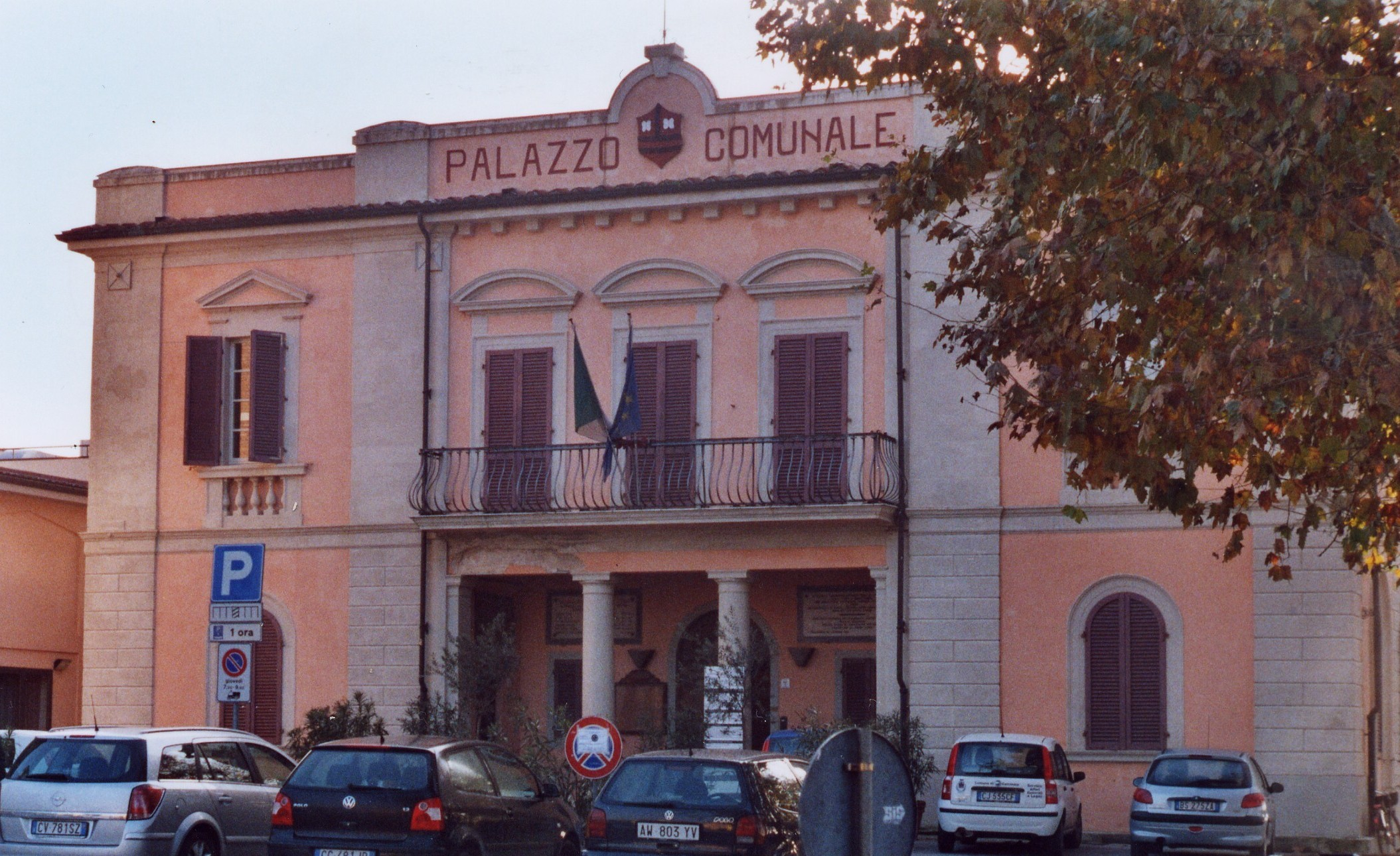 Calcinaia, Province of Pisa, Italy - Palazzo Comunale